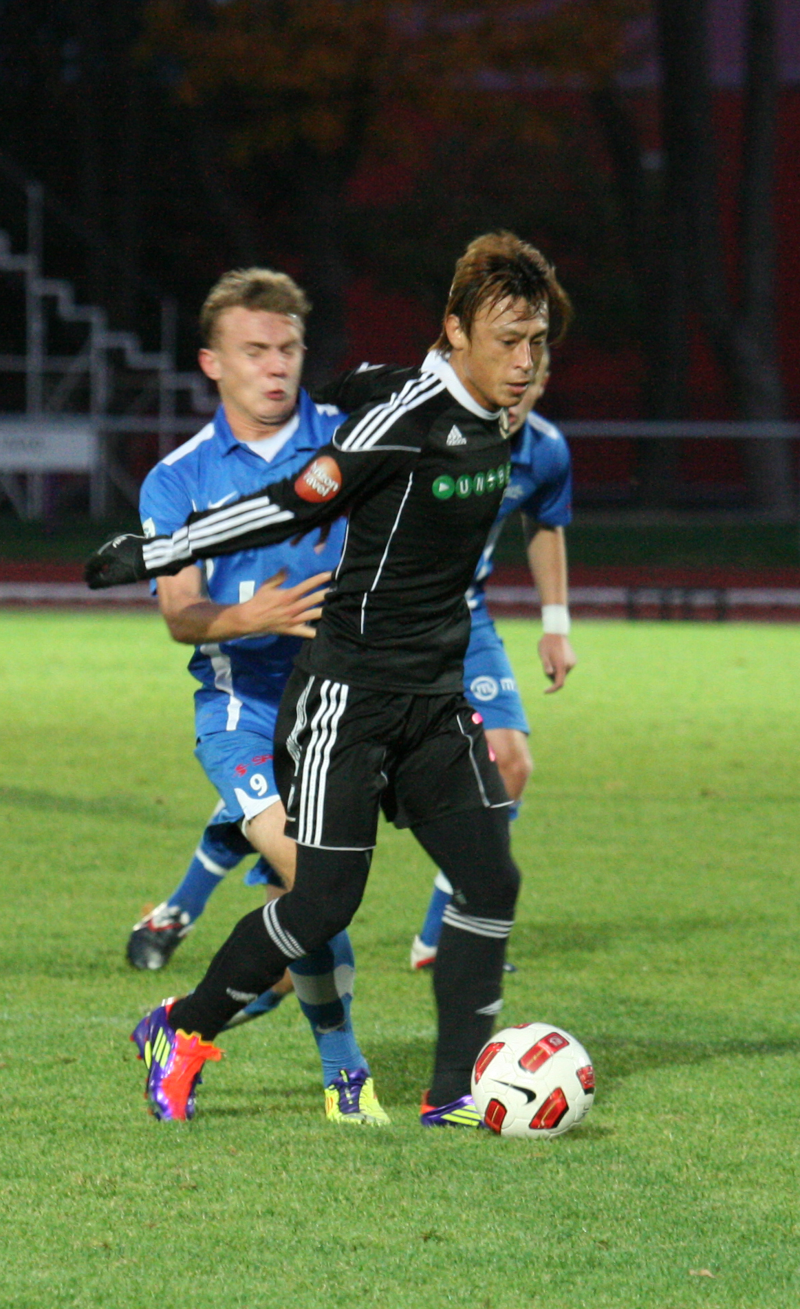 Hidetoshi Wakui mängimas Nõmme Kalju meeskonnavormis (musta värvi)